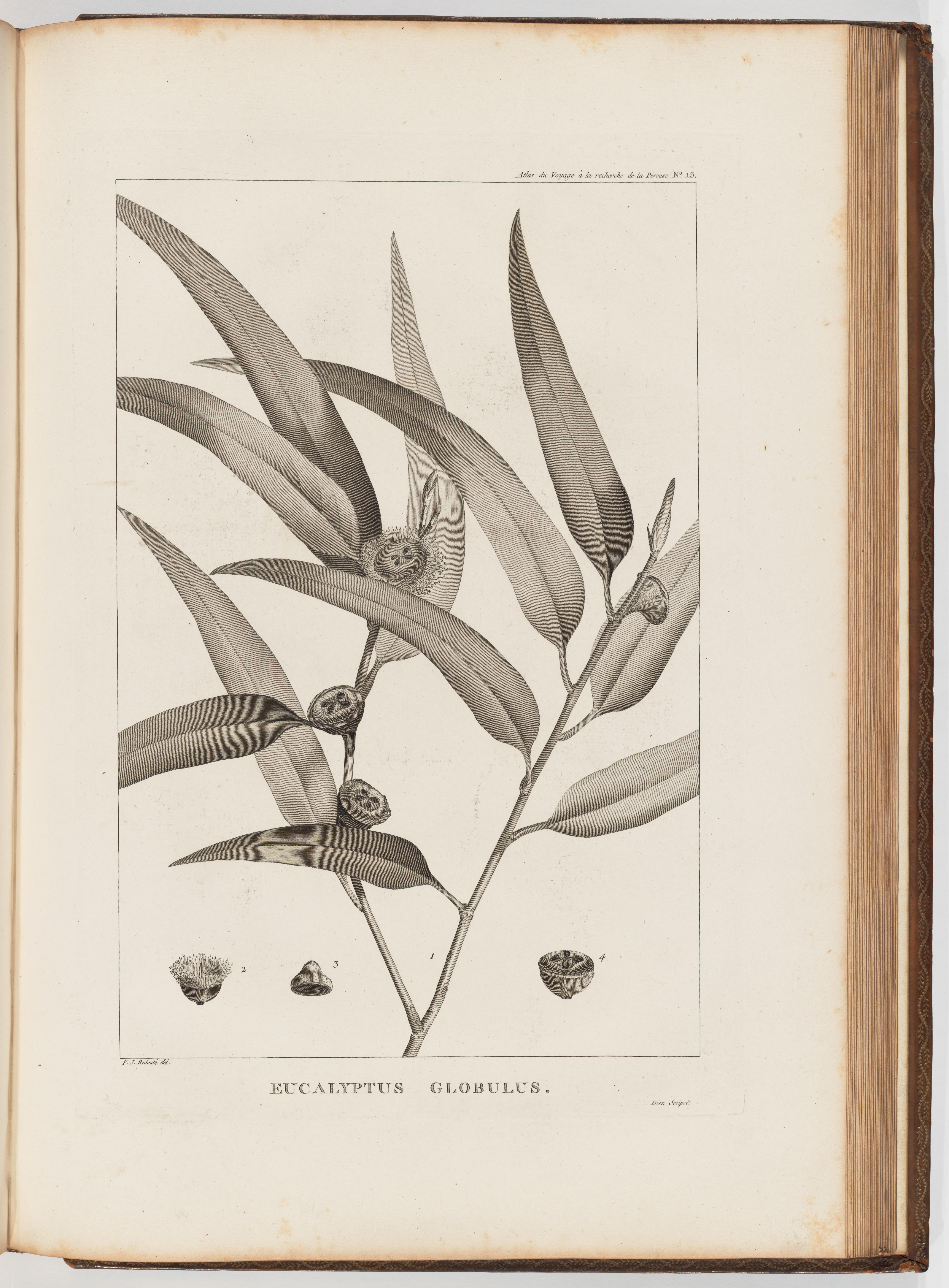 Voyage de La Pérouse autour du monde /publié conformément au décret du 22 avril 1791, et rédigé par L.A. Milet-Mureau.